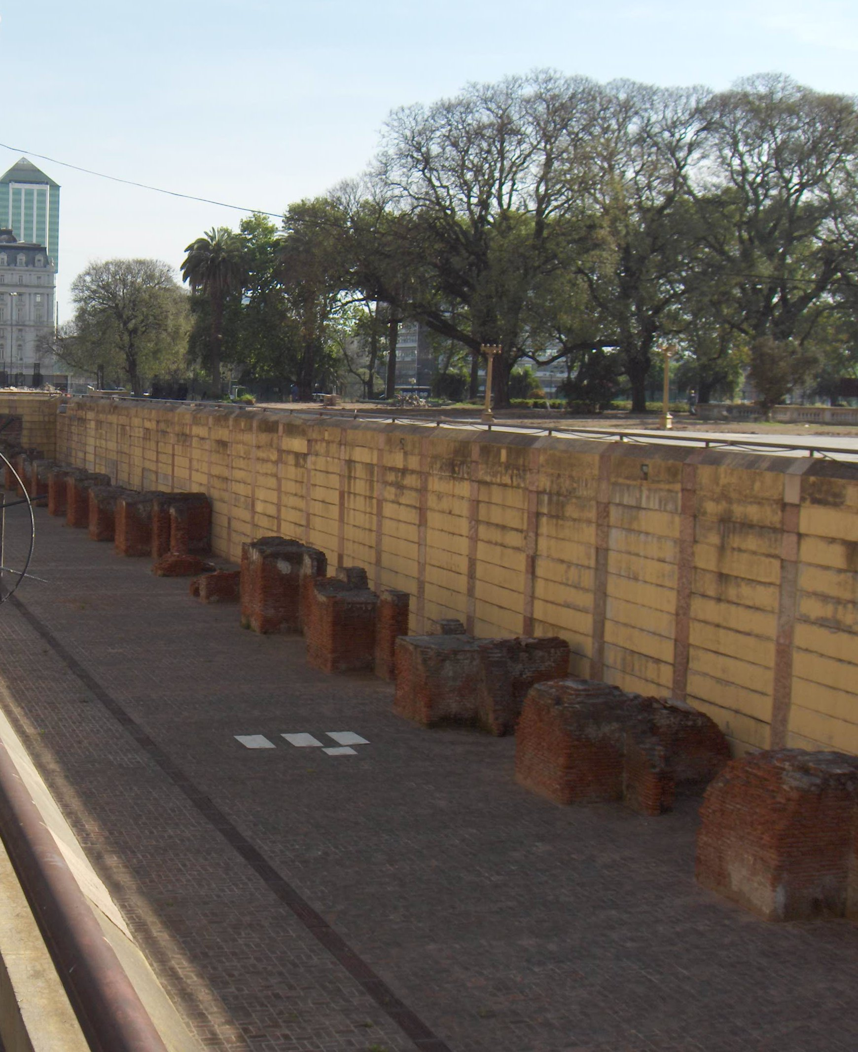 Restos de la Aduana Taylor, Buenos Aires, Argentina.